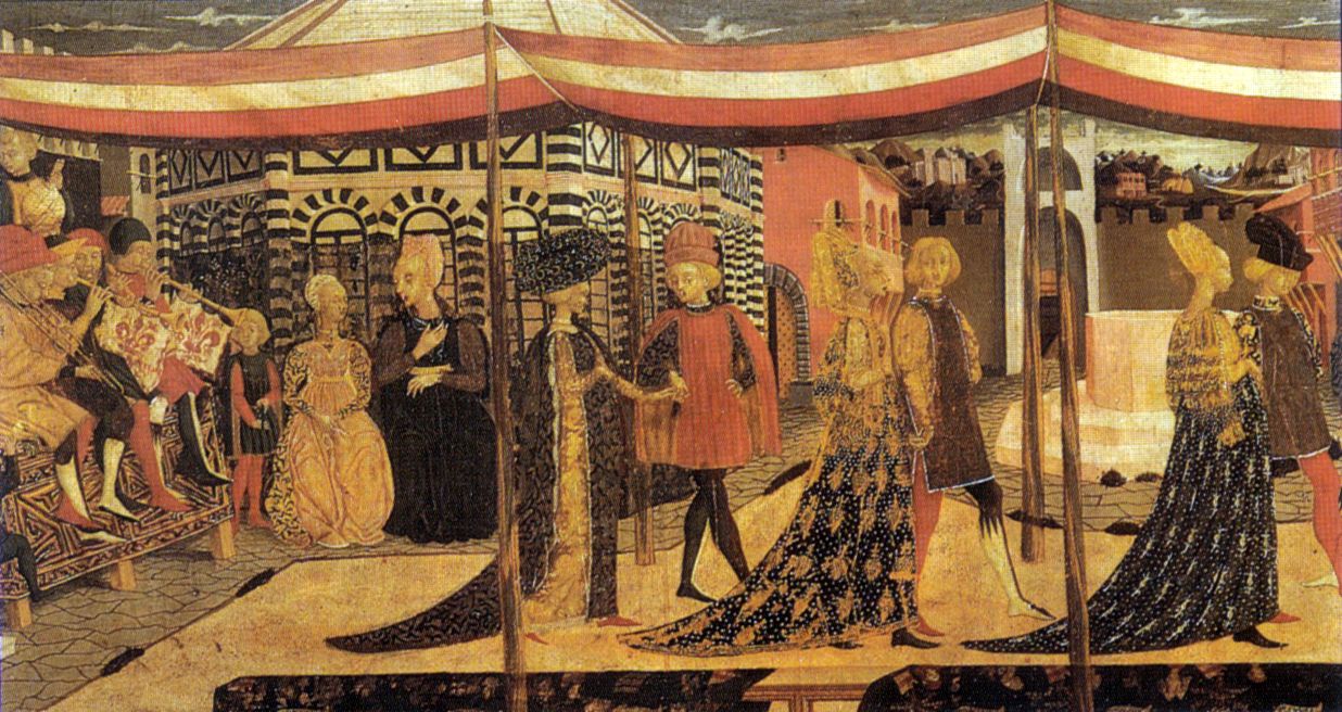 detail Giovanni di Ser Giovanni peignit a tempere sur bois Le triomphe de l'Amour. Laure et Pétrarque y sont représentés, le poète carressant de sa main droite la joue de sa muse.